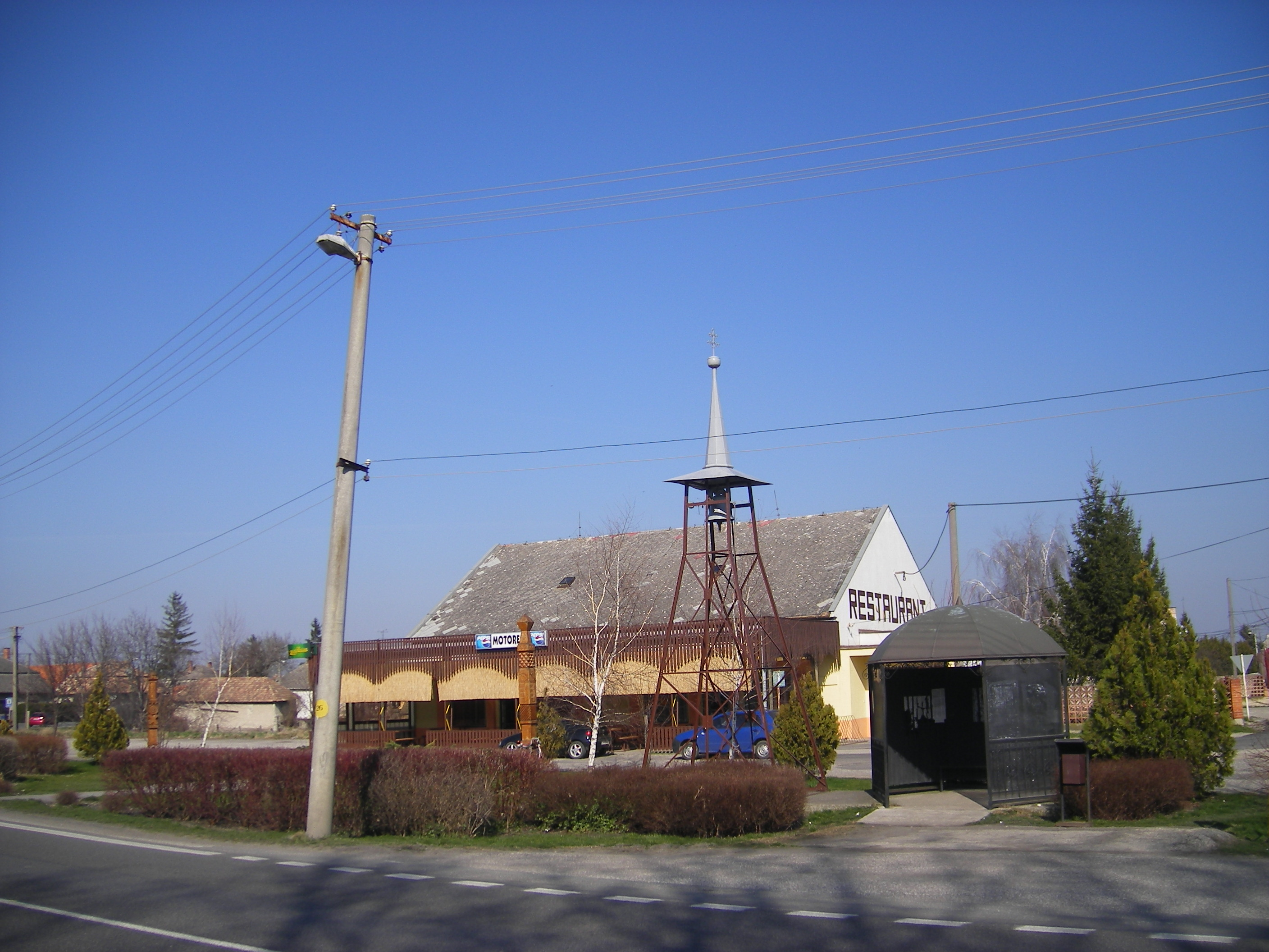 Tany - harangláb